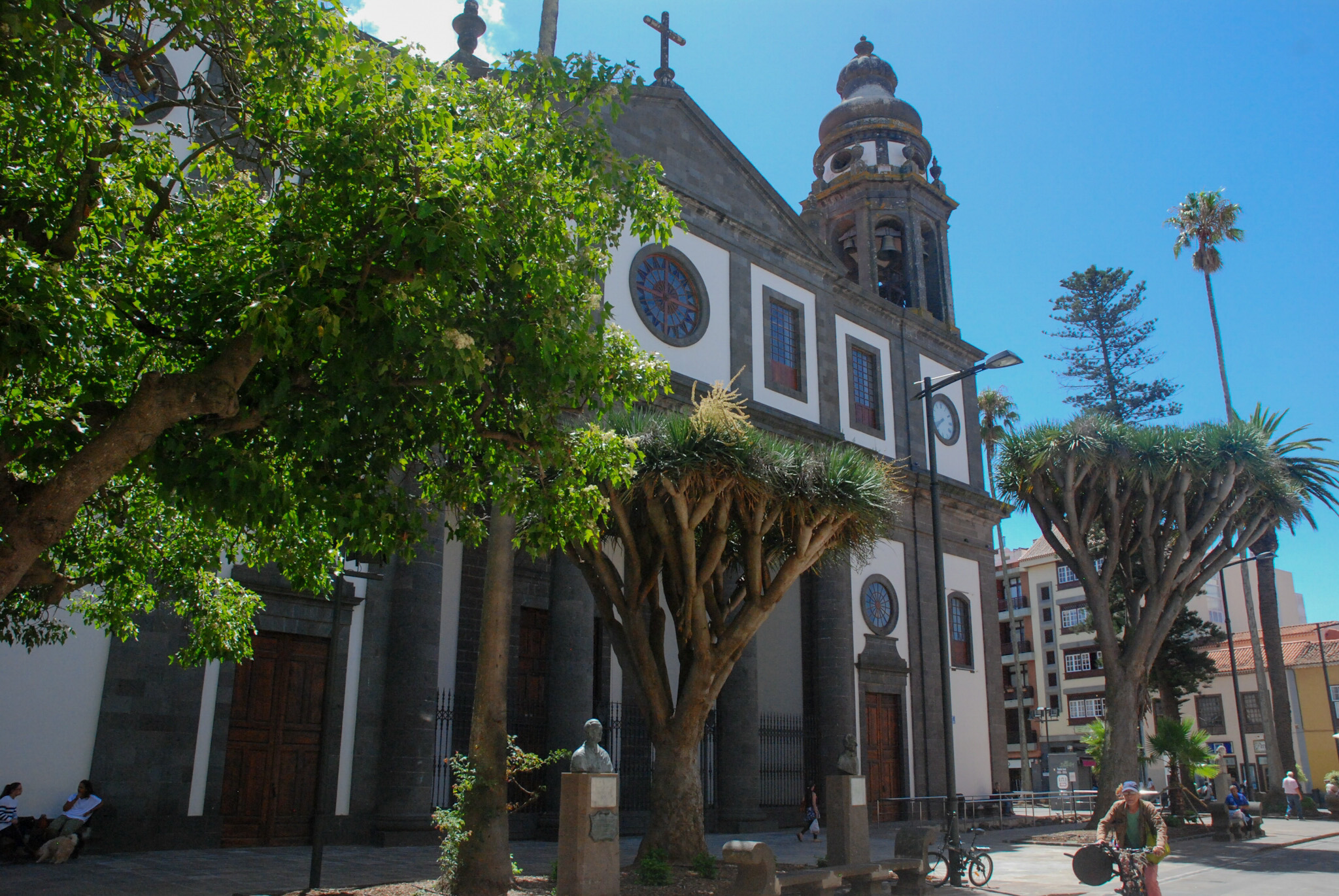 Imagen en la que se puede apreciar el monumento de la catedral de la laguna